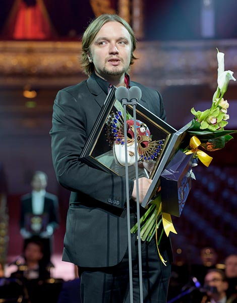 Айнарс Рубикис Фотограф Дмитрий Дубинский 2014